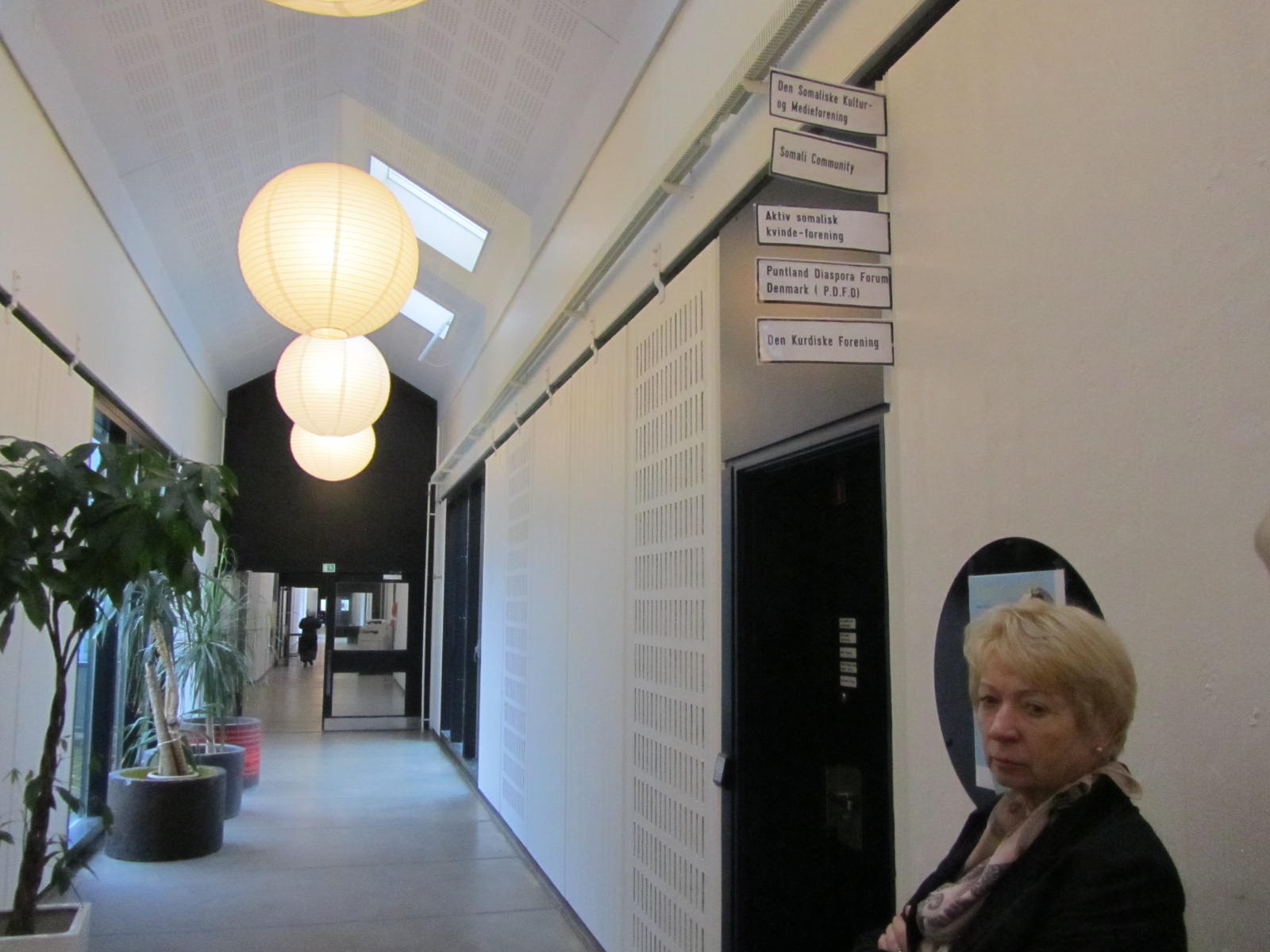 Gellerupi ühenduste maja a. 2011, külas Eesti täiskasvanud õppega tegelejad. Pildil Somaalia ala, ka lillepoti ümbrised aafrikapärased